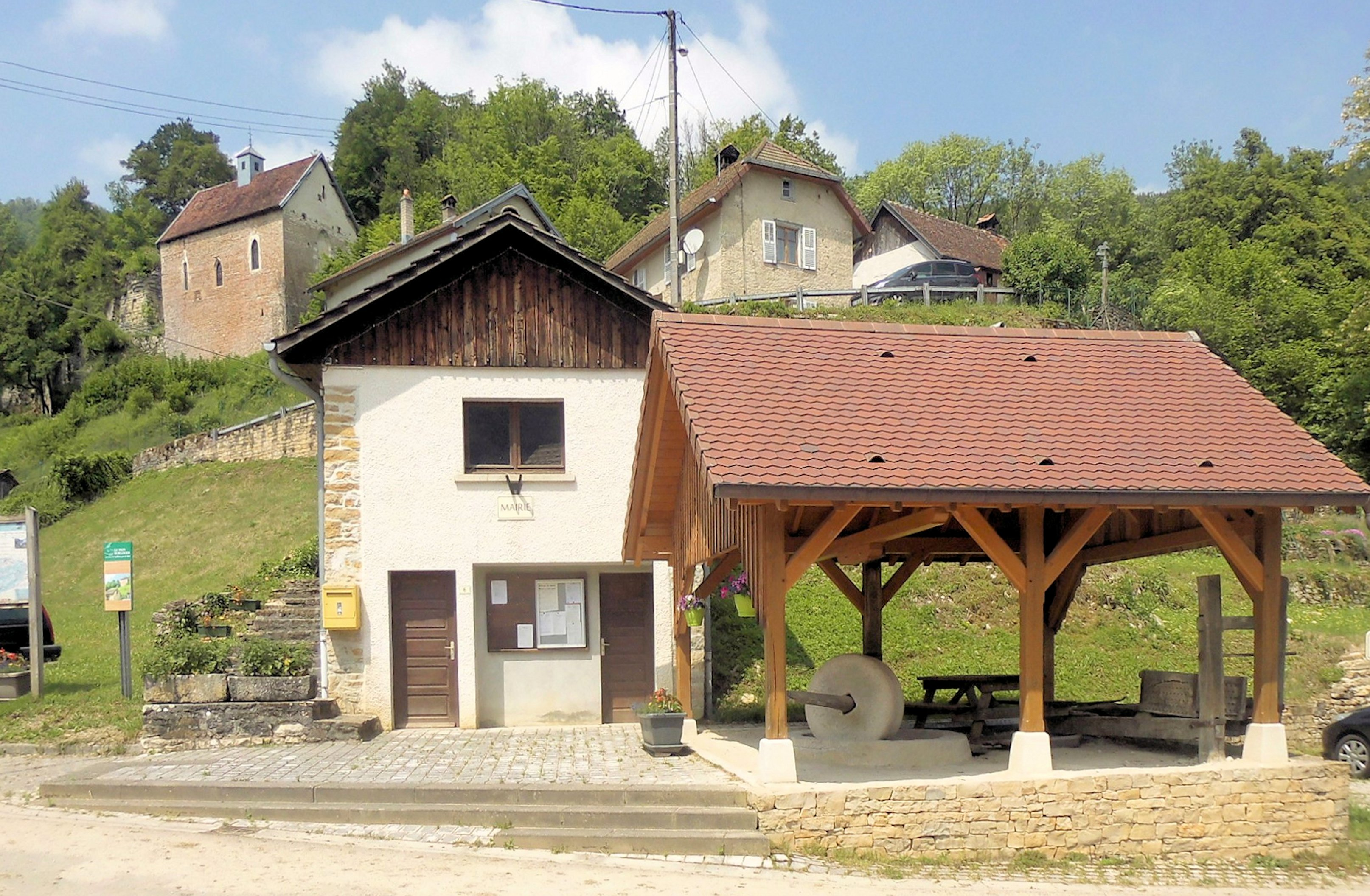 La mairie de Montjoie-le-Château